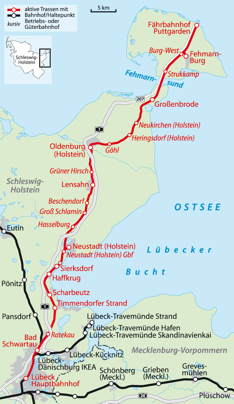 Karte der Bahnstrecke Lübeck–Puttgarden